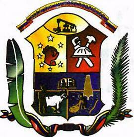 Escudo del Municipio Valmore Rodriguez